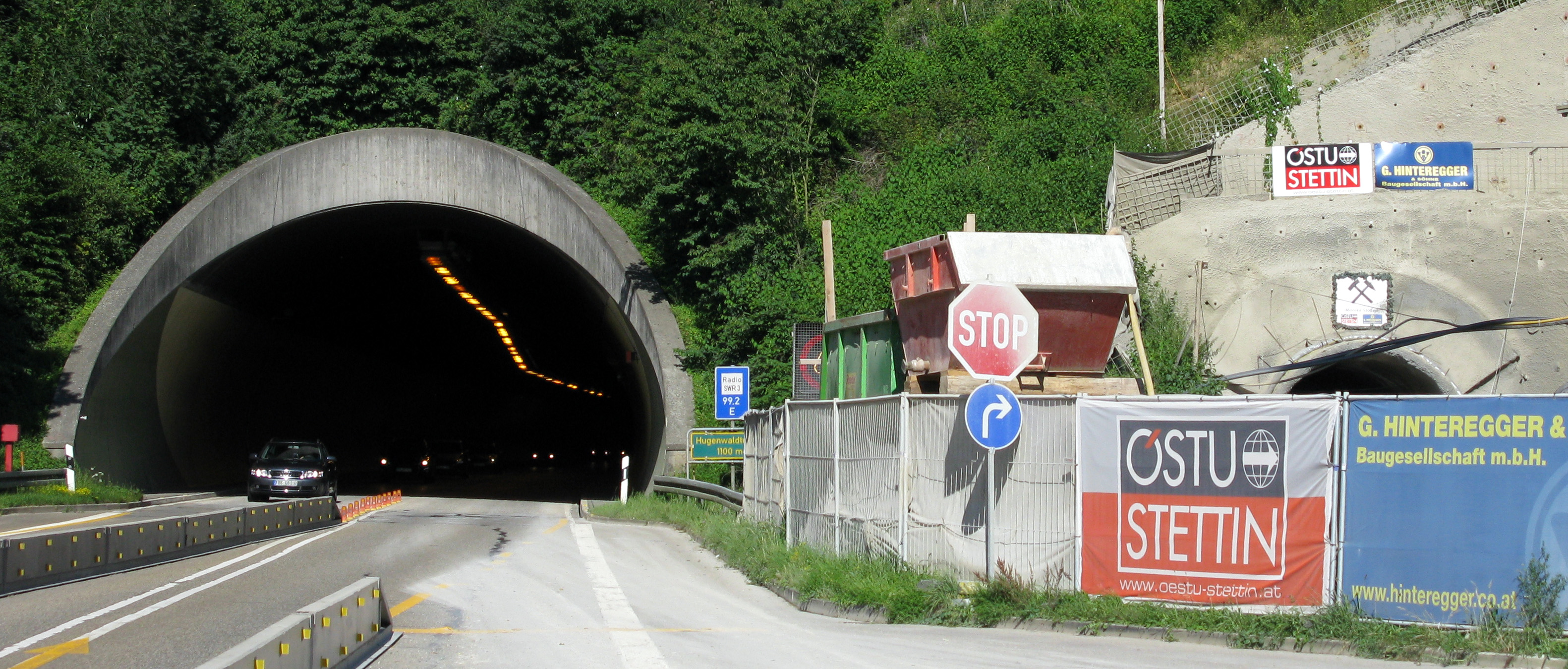 Westportal des Hugenwaldtunnels in Waldkirch mit im Bau befindlichen Rettungsstollen